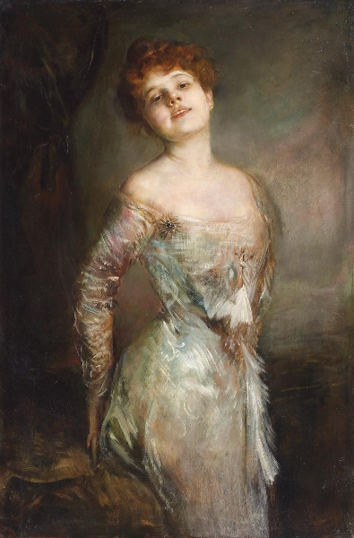 Porträtbildnis der Schauspielerin Fritzi Scheff. Kniestück. Öl auf Karton. 116 x 78,5cm. Rahmen. Rückseitig: Auf dem Rahmen Klebeetiketten der Kunstausstellung Düsseldorf 1907 und der Kunstmesse Köln 1971. Ausstellung: Deutsch-Nationale Kunstausstellung Düsseldorf, 11. Mai - 29. September 1907, Nr. 42.